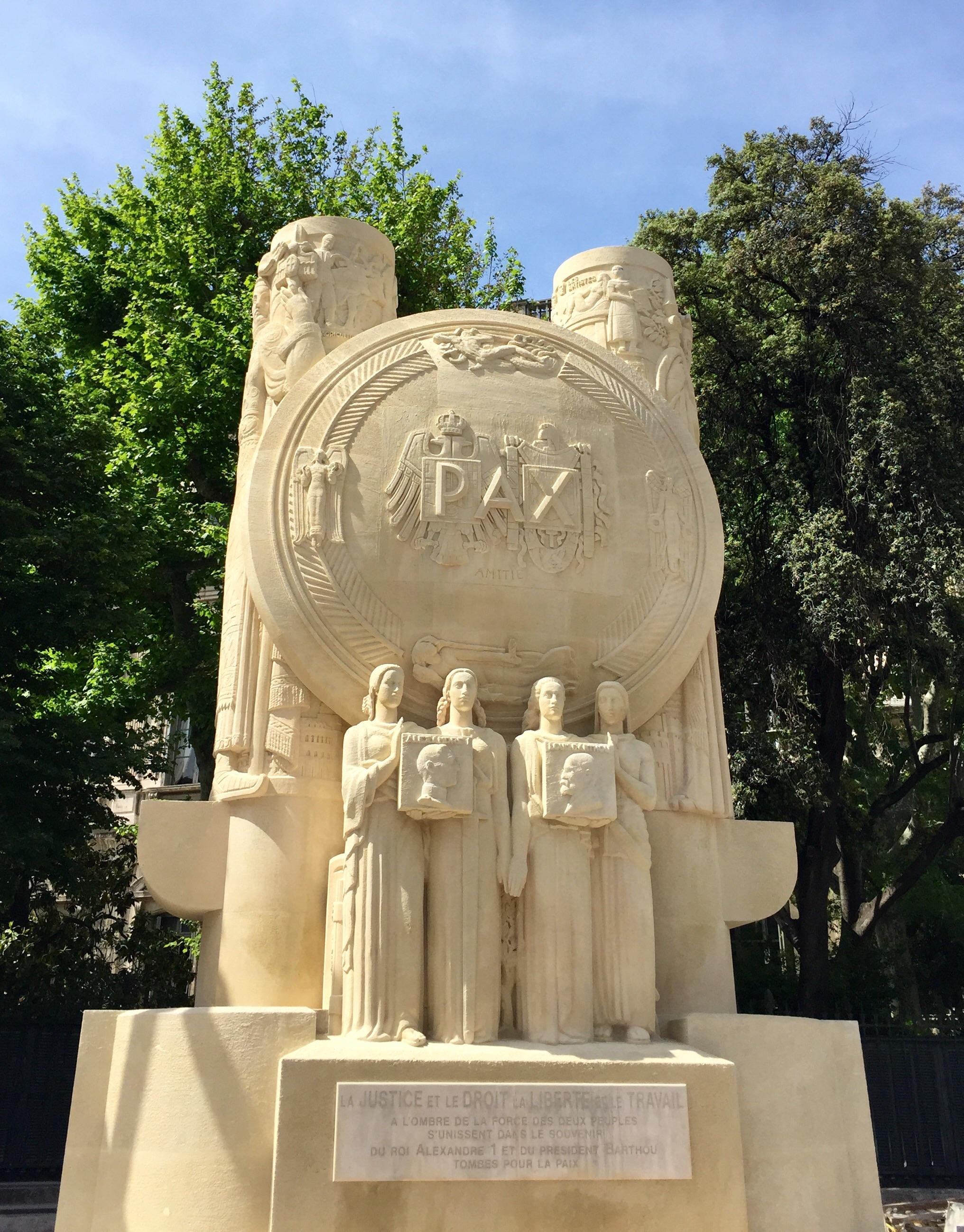 Monument se trouvant sur la rue de Rome (Marseille, France)